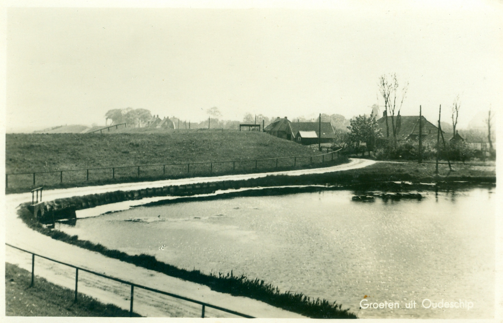 't Eilsgat bij Oudeschip nadat de molen is afgebroken